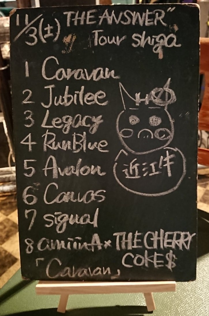 amiinAセトリボード(20181103(1))